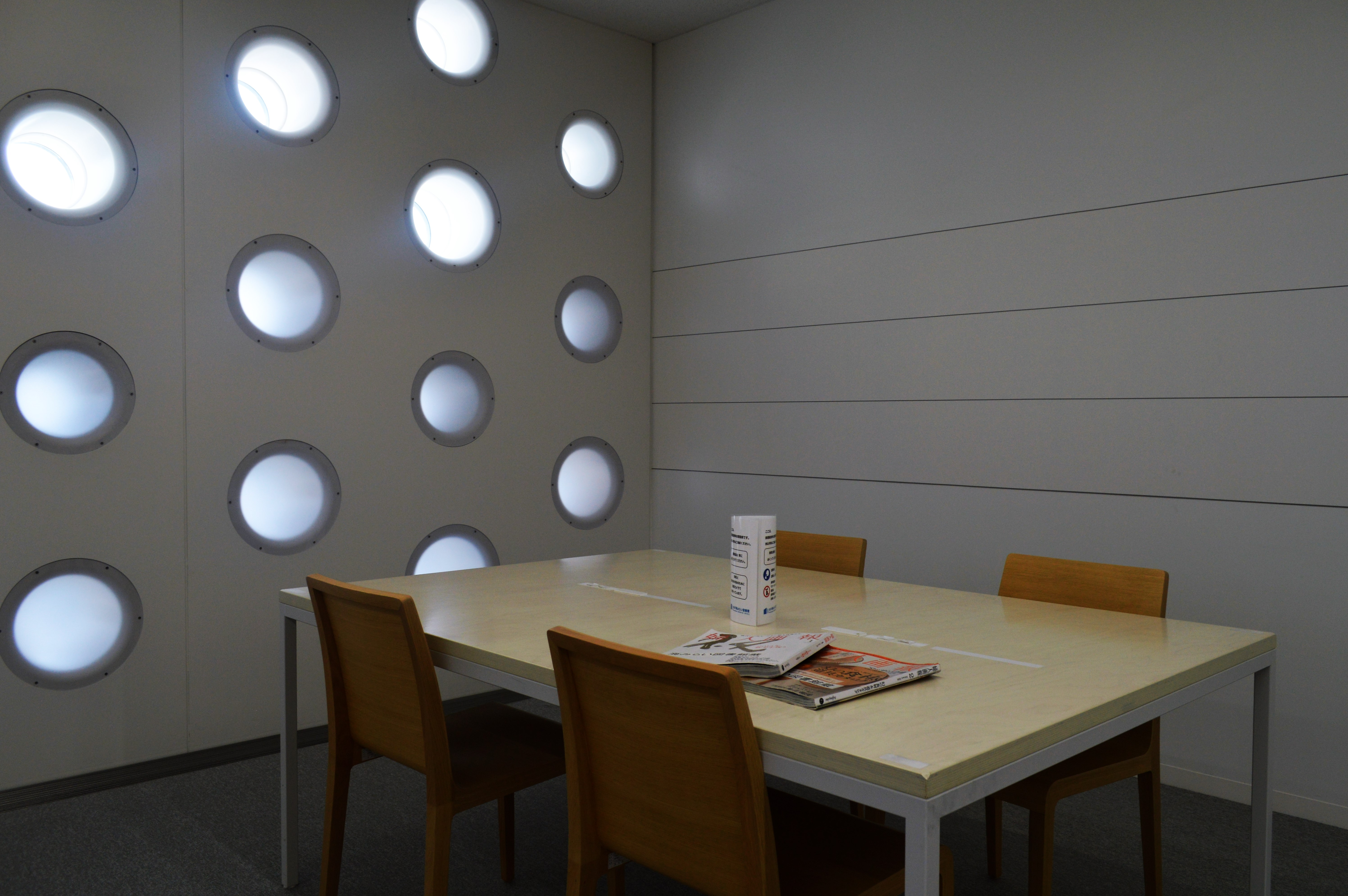 石川県金沢市 金沢海みらい図書館。金沢市図書館のひとつ。2階の閲覧席。